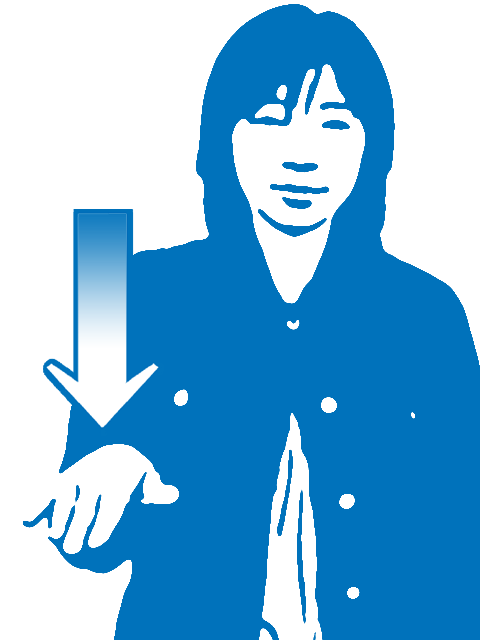 日本手話の「です００１」2007.04,04.-Yokohama.B